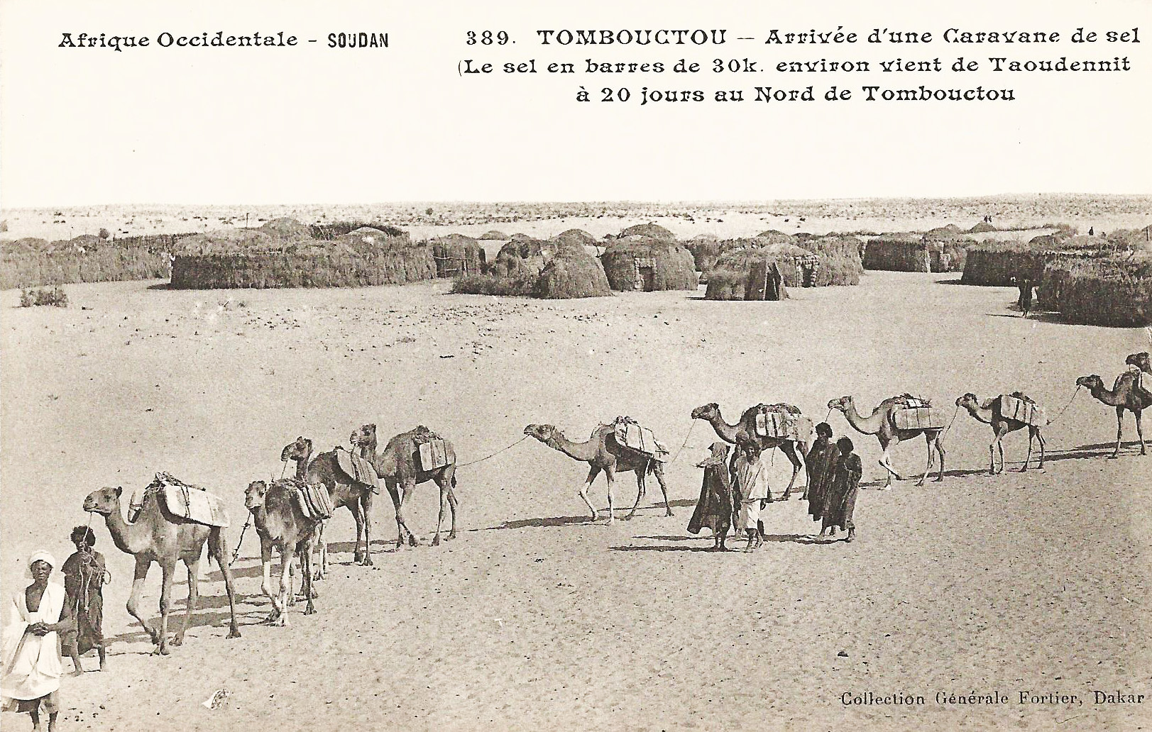 François-Edmond Fortier, Tombouctou. Arrivée d'une caravane de sel. Le sel en barres de 30 k. environ vient de Taoudennit, à 20 jours au nord de Tombouctou. Afrique Occidentale - Soudan.